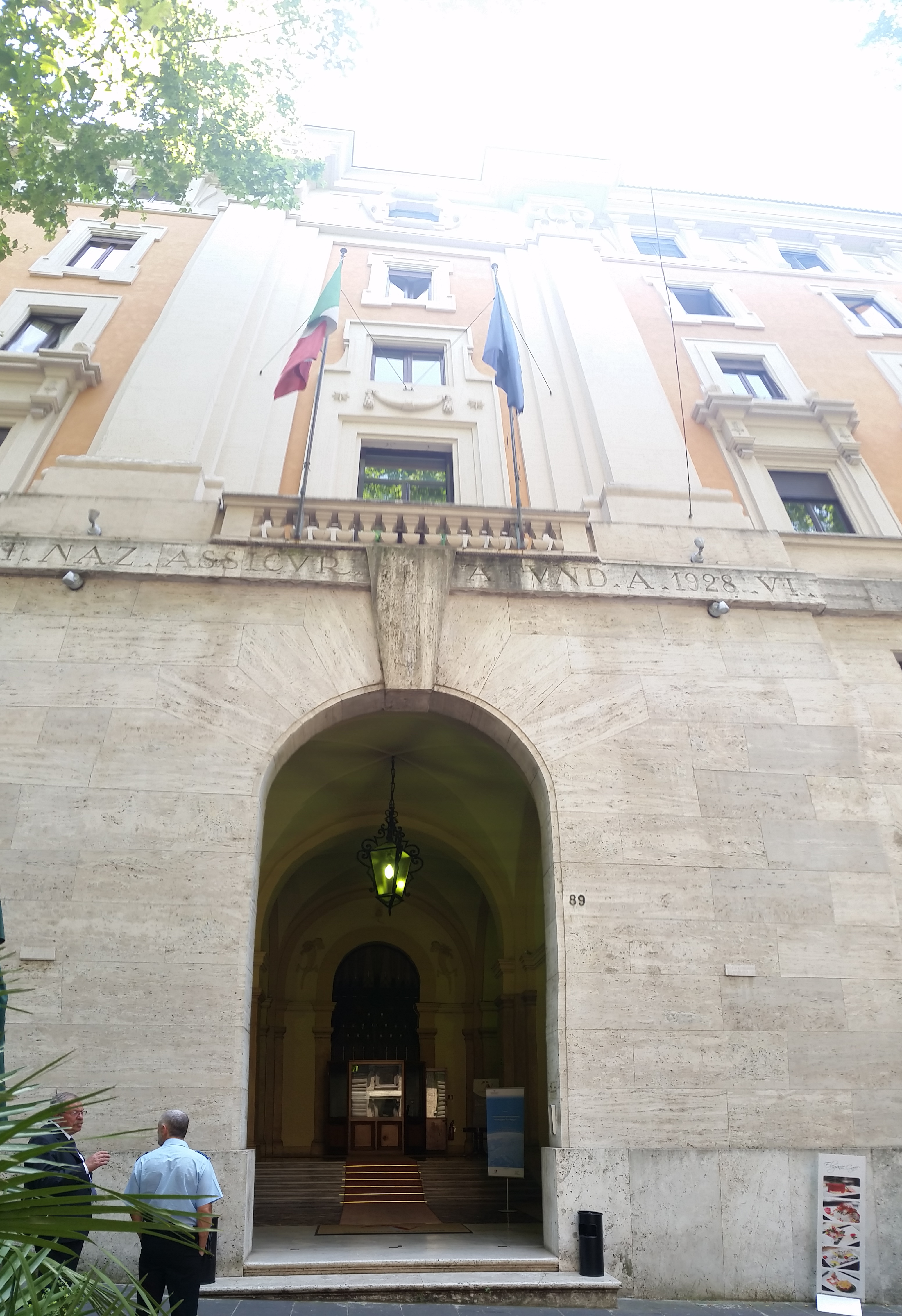 Sede Fintecna SpA (già sede IRI) a Roma, Via Veneto 89